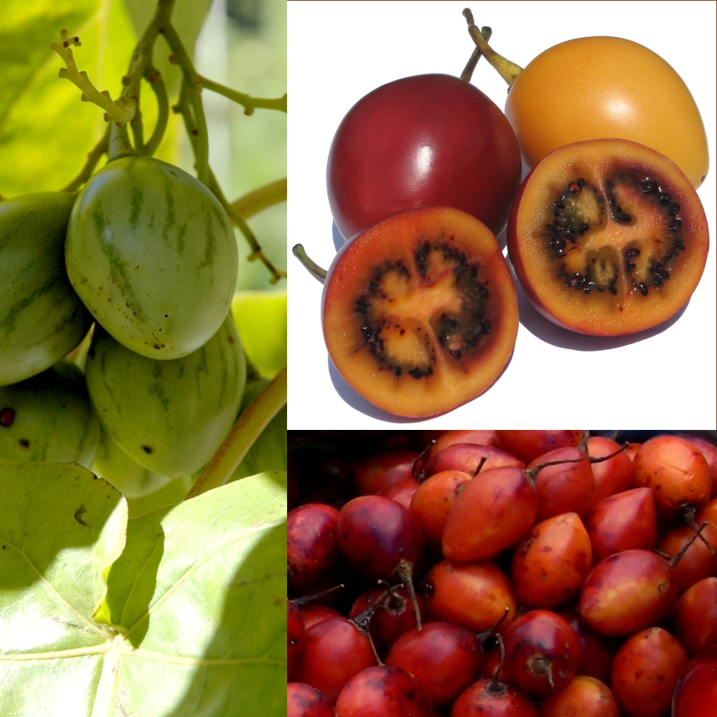 Grafika podręcznika Wikijunior:Owoce. Tamarillo, cyfomandra grubolistna, pomidor drzewiasty (Solanum betaceum syn. Cyphomandra betacea).